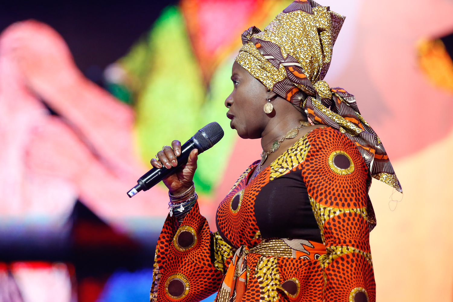 Angelique Kidjo durante o 25o Premio da Musica Brasileira no Theatro Municipal. Foto: Roberto Filho (14/05/14)